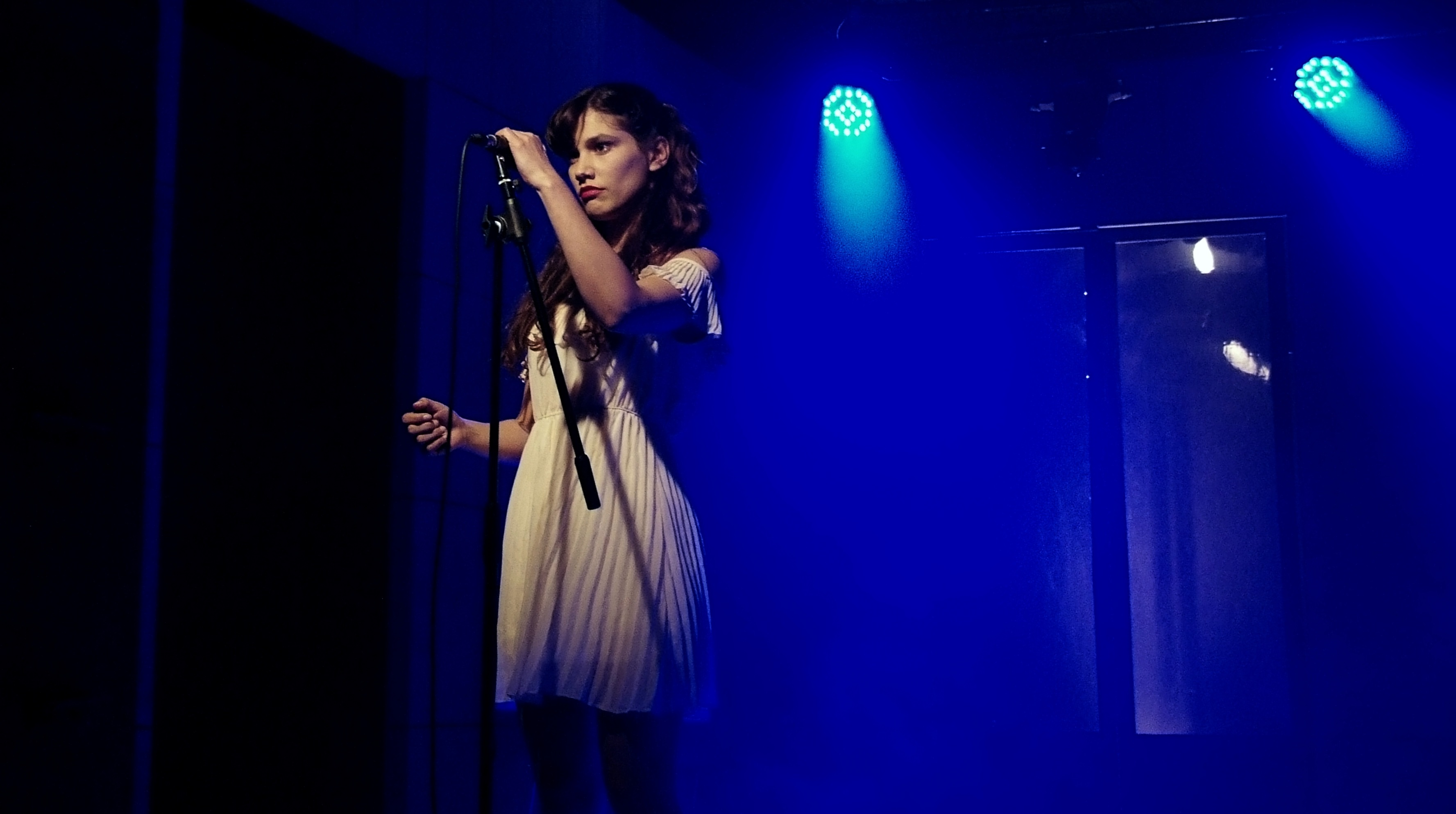 גלוריה בס בהצגה "רוברט זוקו" מאת ברנאר-מארי קולטס, בעיבודו ובימויו של רועי מליח רשף, בסטודיו למשחק ניסן נתיב, 2012